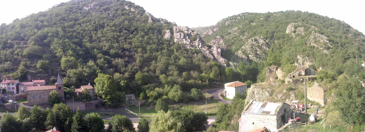 Vue sur Saint Etienne sur Blesle